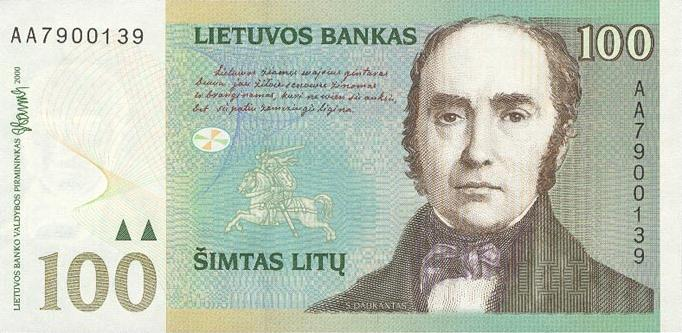 Lithuania 100 litu 2000